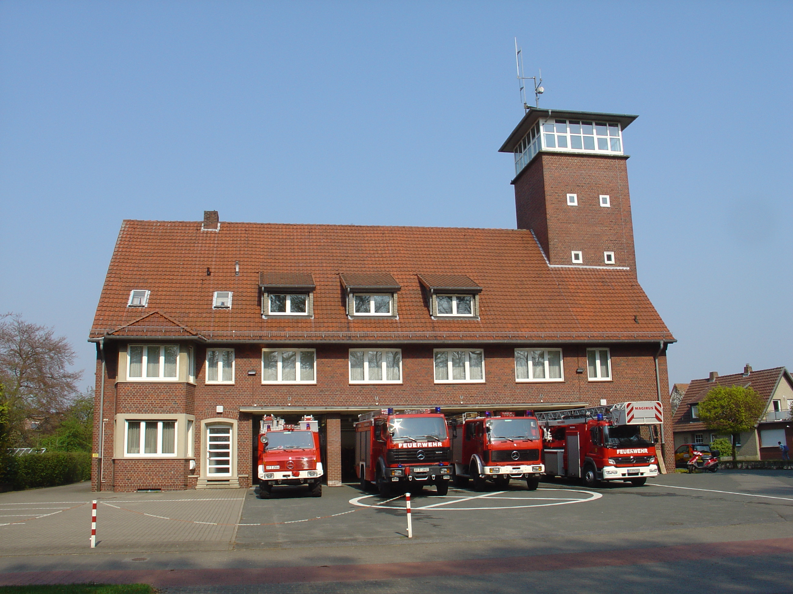 Feuerwehr Harsewinkel mit einem Teil der Fahrzeuge